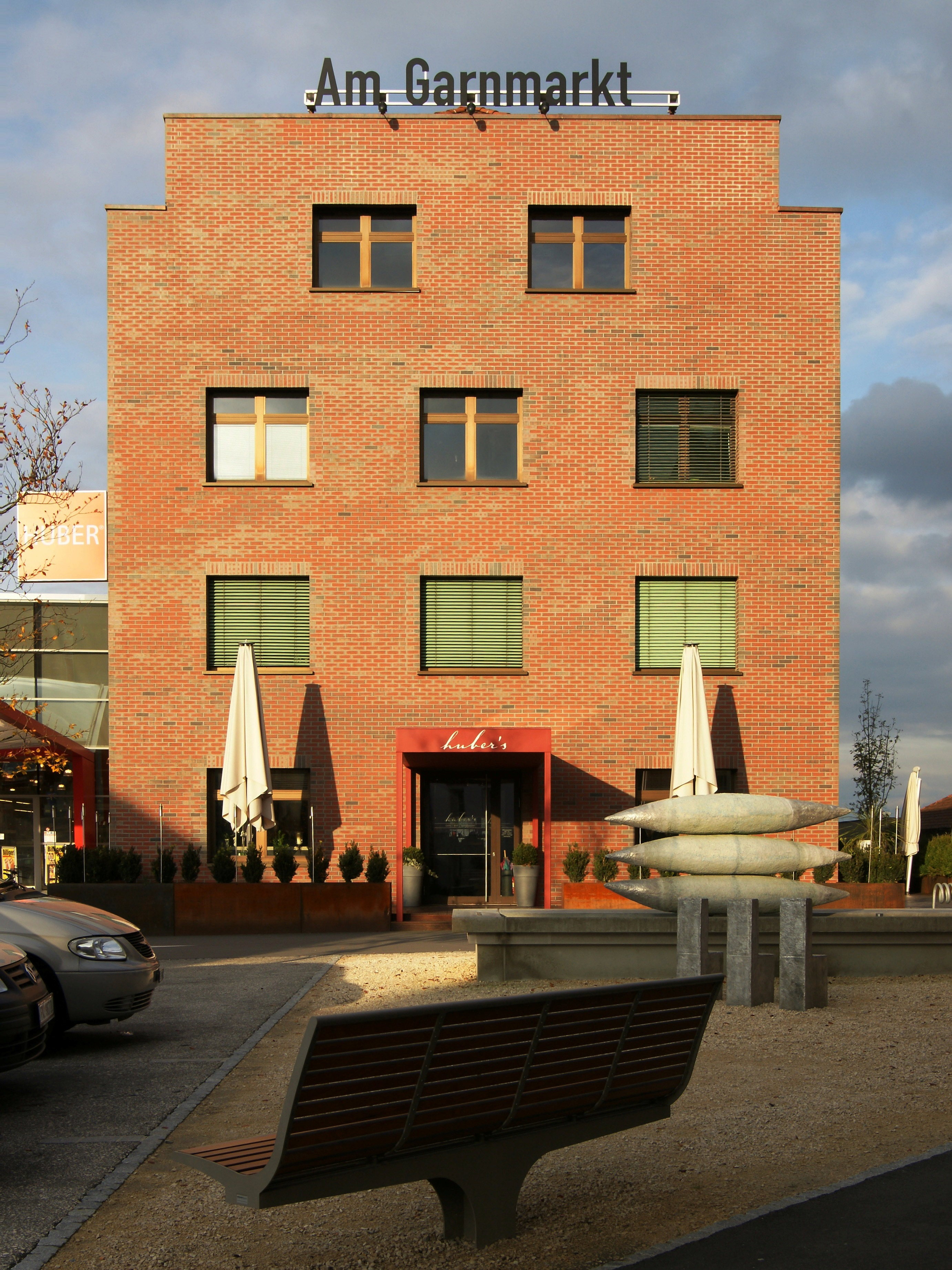 Am Garnmarkt Flagship Store von Huber Tricot im Zentrum von Götzis, Vorarlberg.